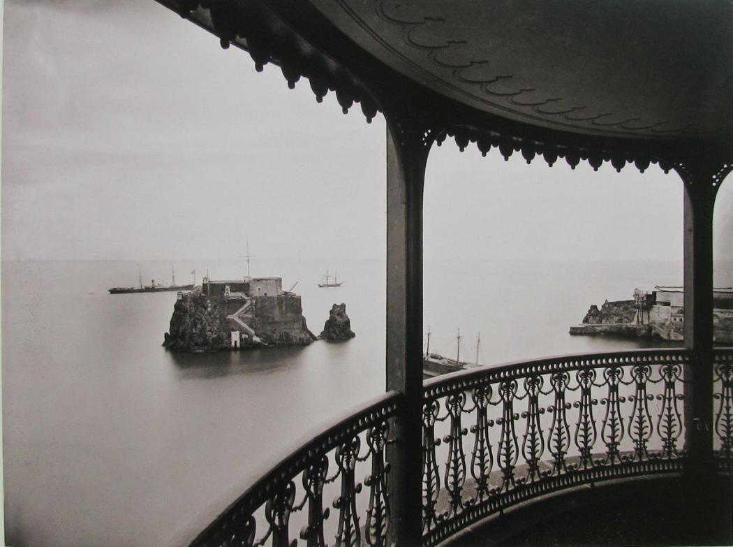 Mirante da Quinta Vigia.Photographia-Museu Vicentes (NAF 186), Funchal, ilha da Madeira Pub. catálogo da exposição Obras de Referência dos Museus da Madeira.500 Anos de História de Um Arquipélago, mostra comissariada por Francisco Clode de Sousa, Galeria de D. Luís, Palácio da Ajuda, Novembro de 2009, p. 445.